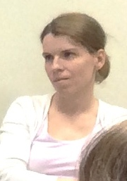 Vendula Vartová-Eliášová